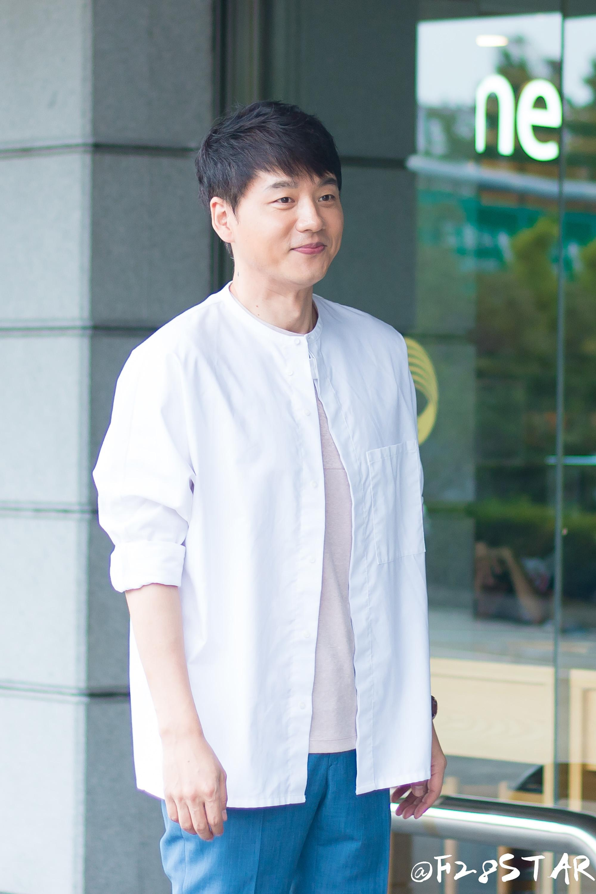 조선말: 20170819 해피투게더 출근길